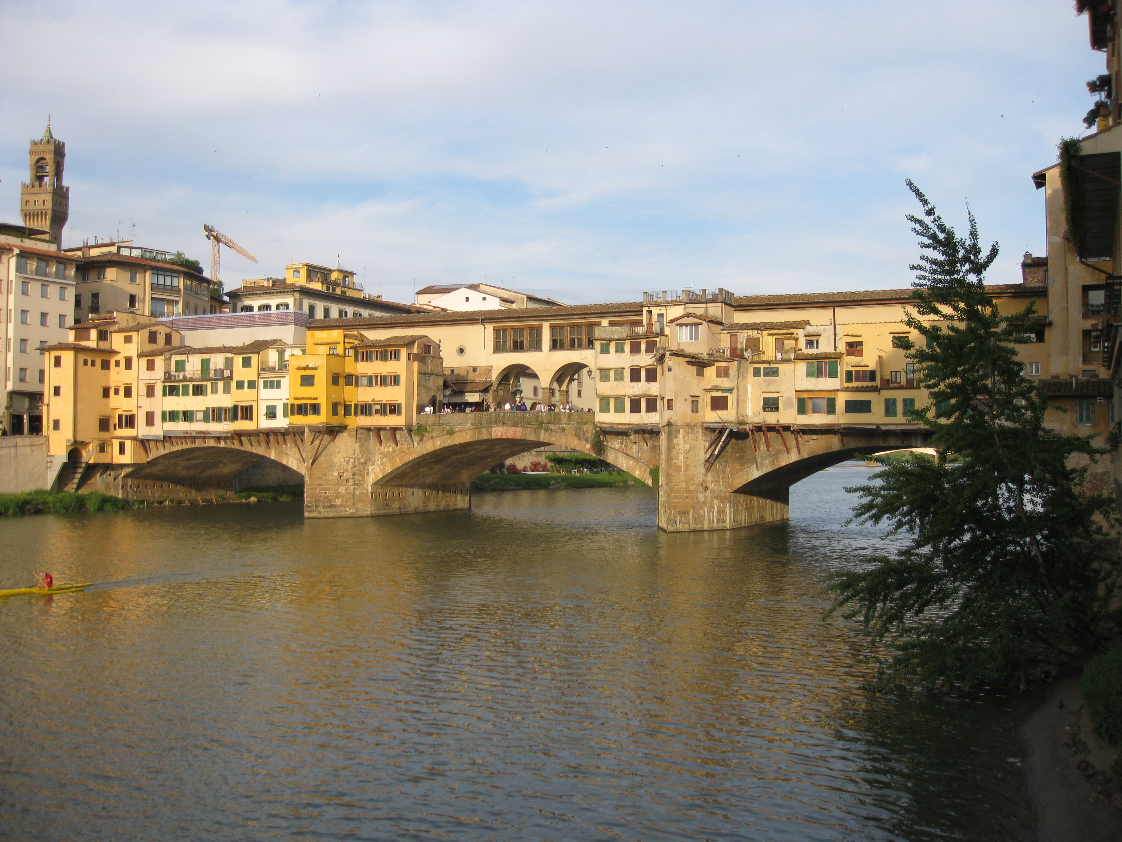 Vasari Corridor מעבר ואזארי